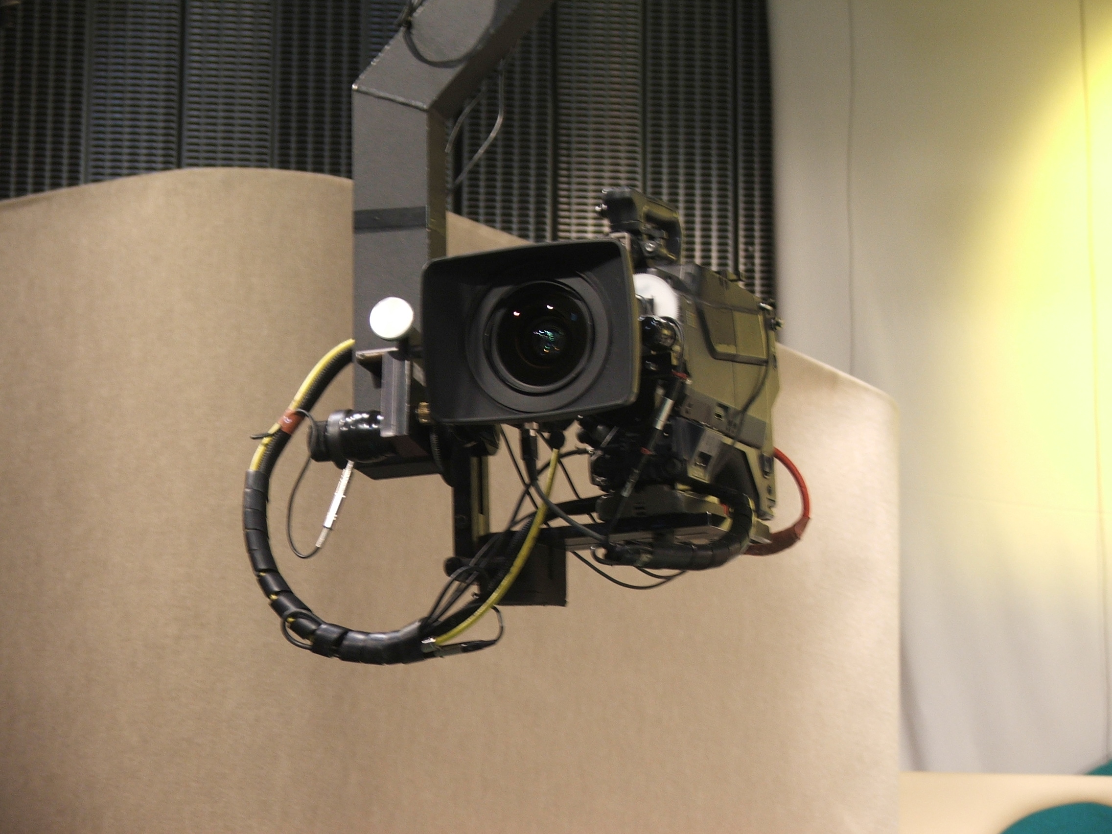 Cámara Sony con lente Canon de Resolución Standard montada sobre Jimmy Jib